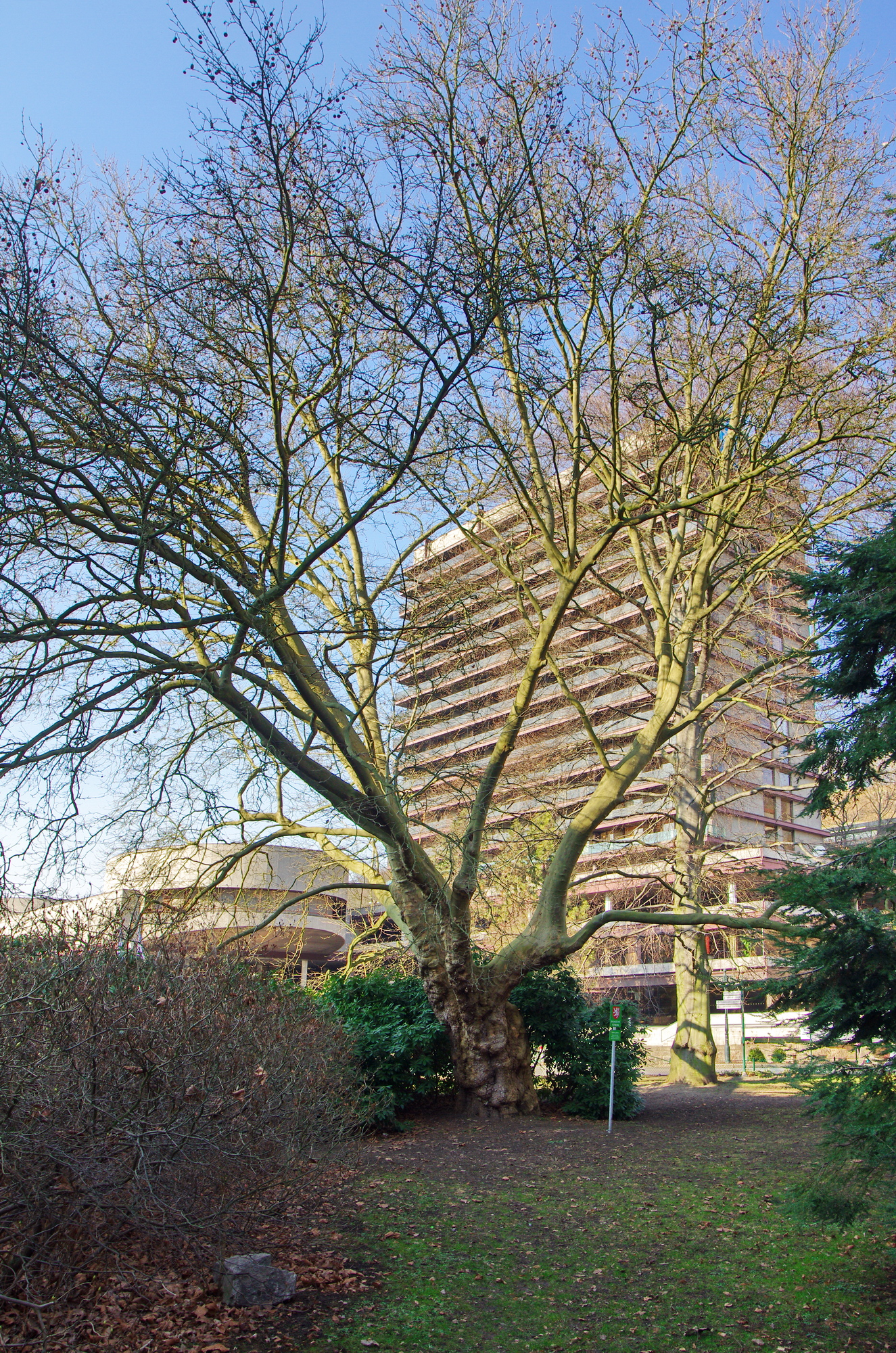 památný strom Sadový platan v Dvořákových sadech v Karlových Varech